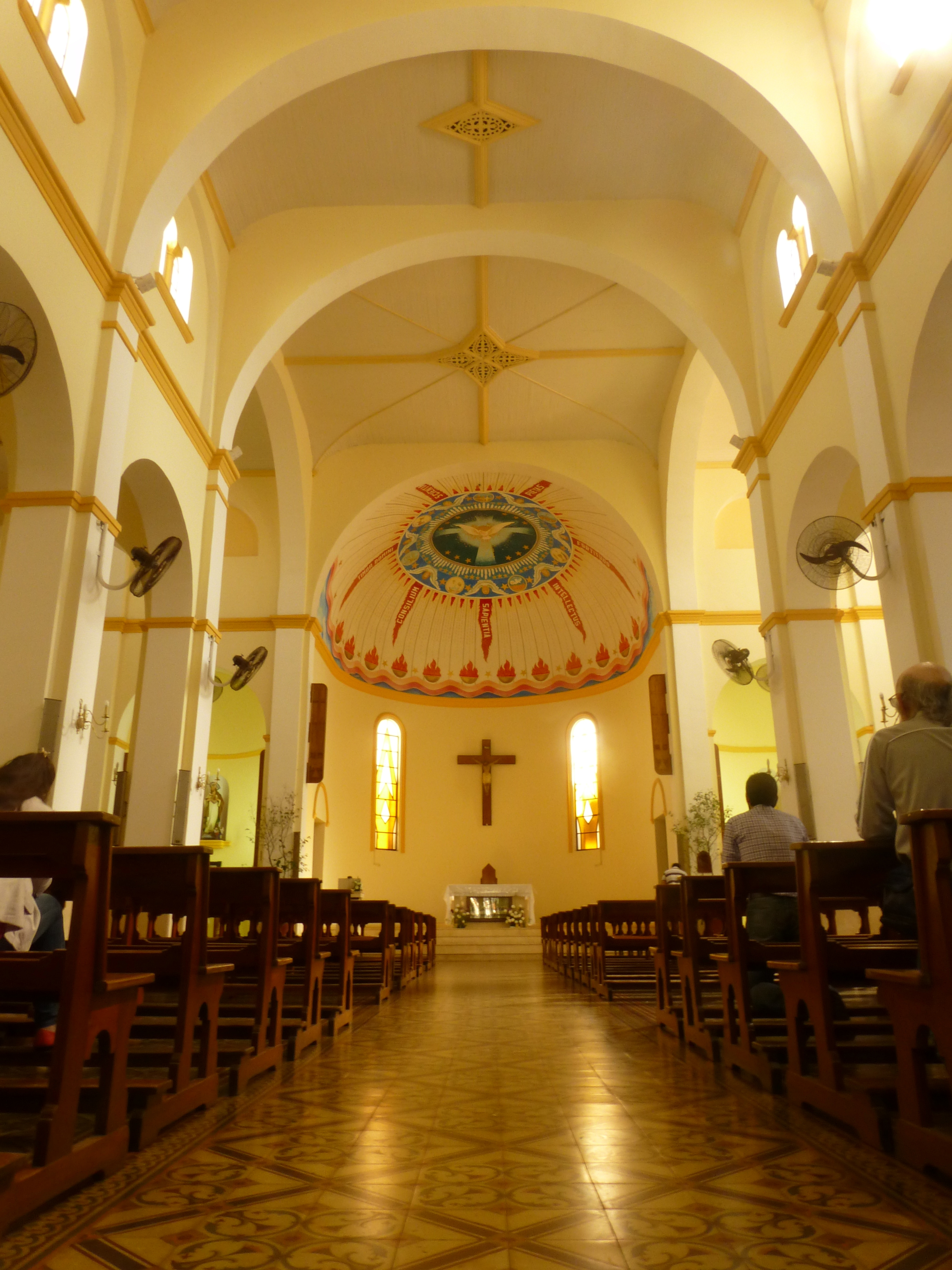 Catedral San José de Posadas, en la provincia de Misiones.